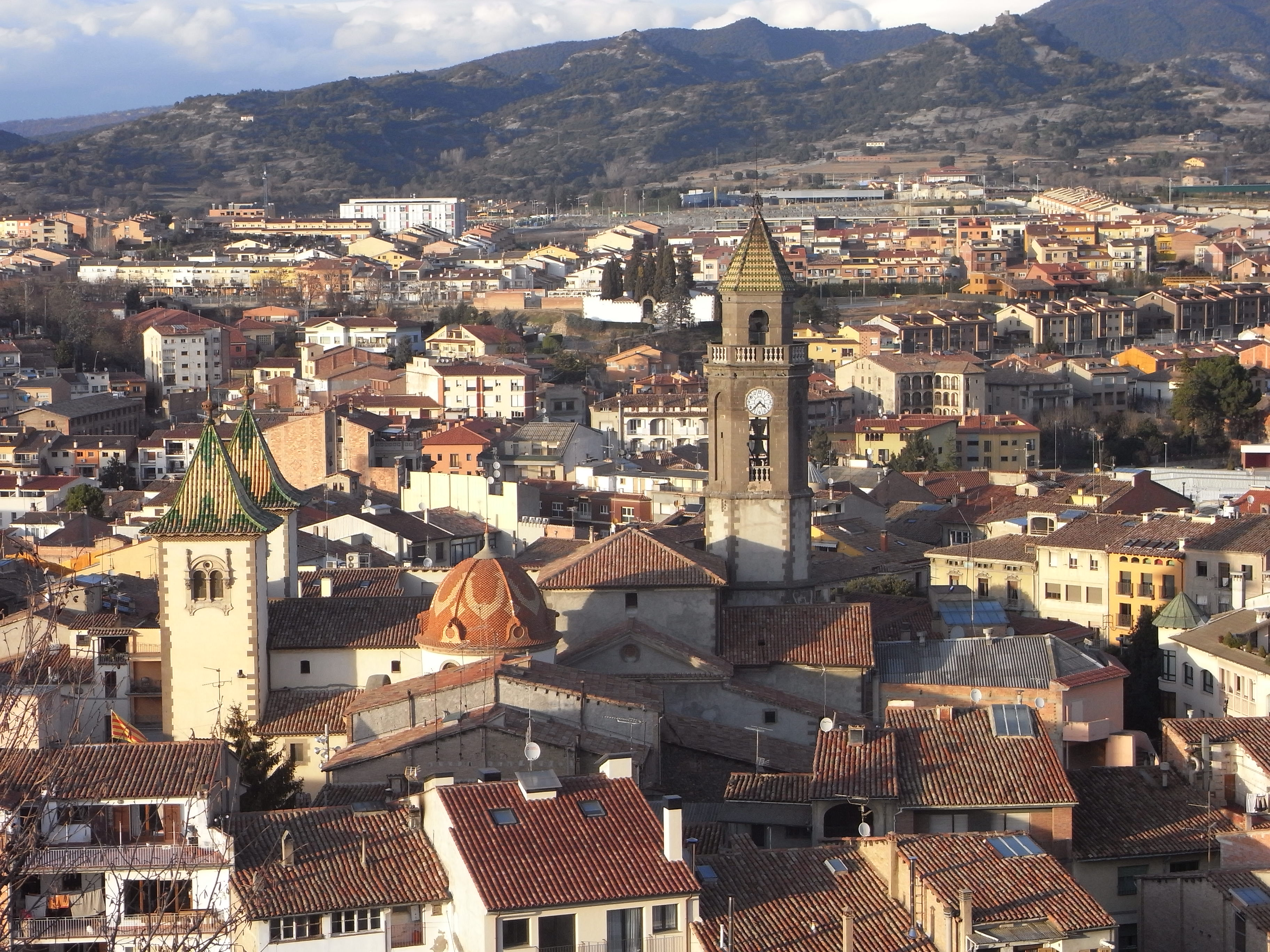 Torelló, vist des del Puig de Sant Feliu